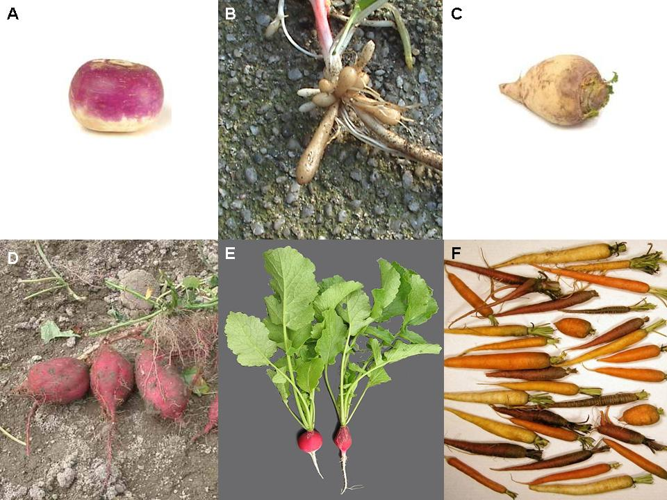 rutabaga